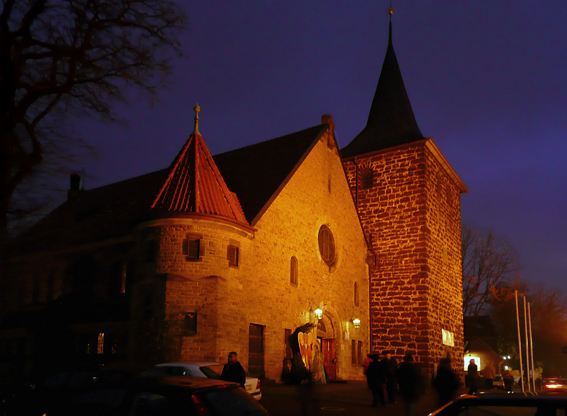 Kirche Bothfeld beim Weihnachtsmarkt